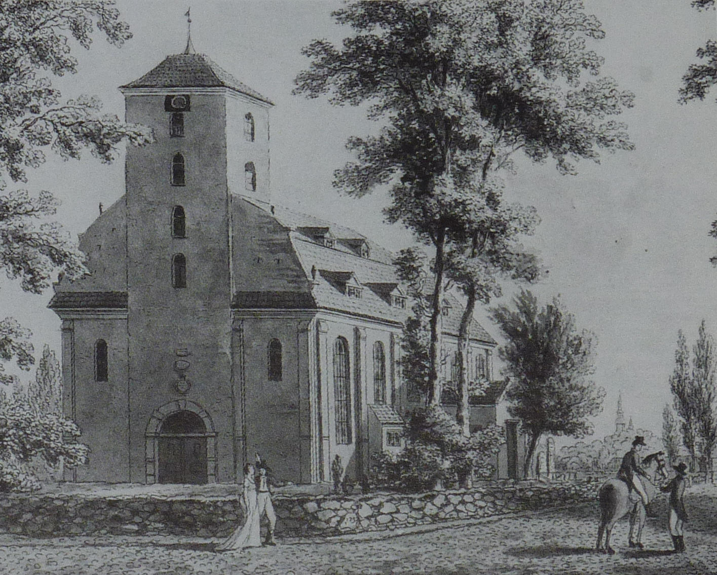 Christianskirche in Ottensen vor dem Umbau, Lithographie